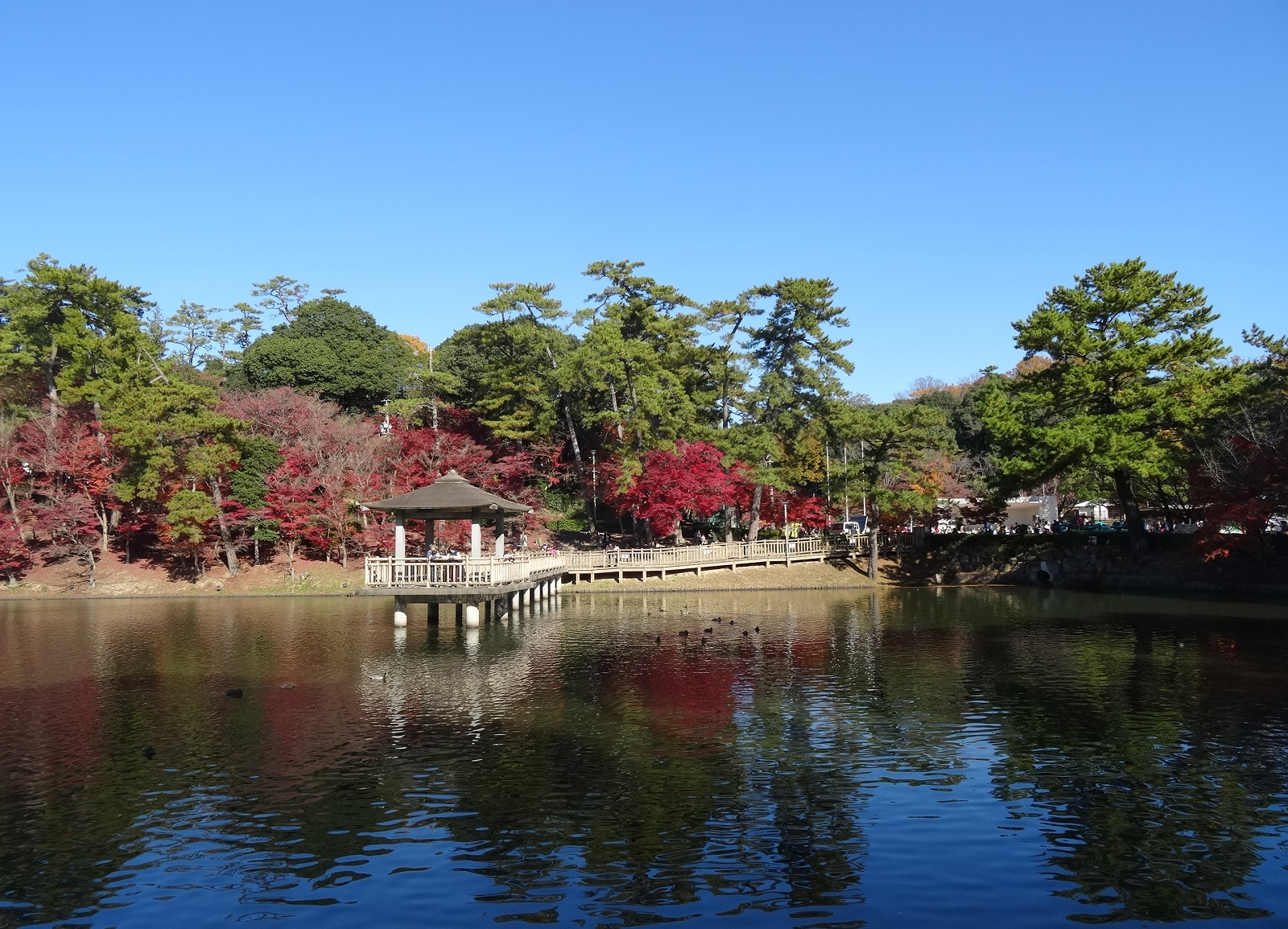 東公園・あしのべ池（愛知県岡崎市）